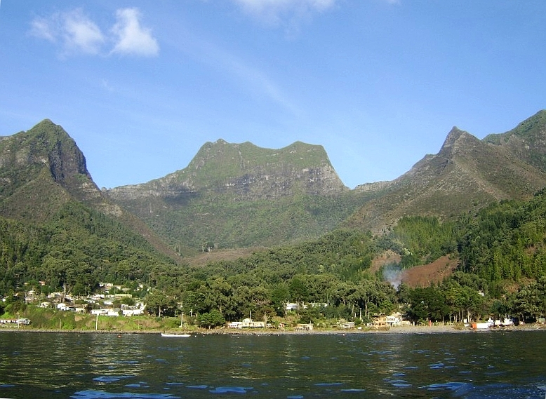 Bahía Cumberland - Isla Robinson Crusoe - Archipiélago Juan Fernández - Chile